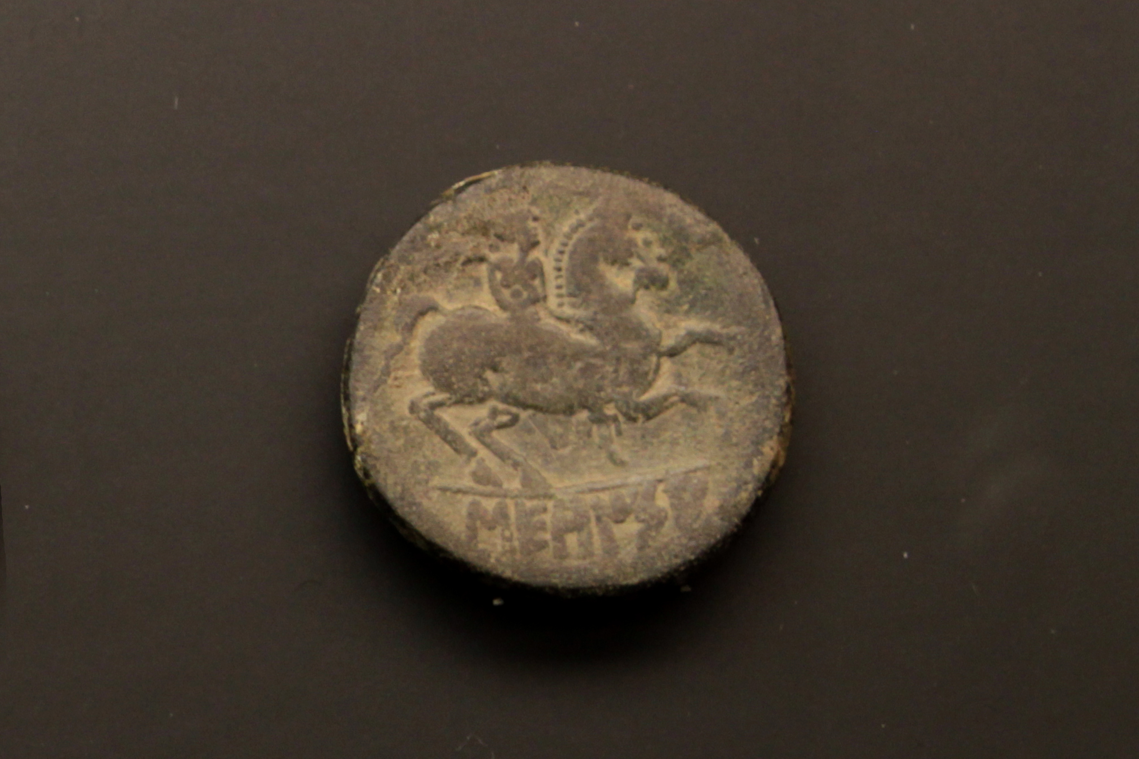 Moneda ibera de Sekaisa de los siglos II al I aC. Depositada en el Museo de Prehistoria de Valencia, Comunidad valenciana, España.